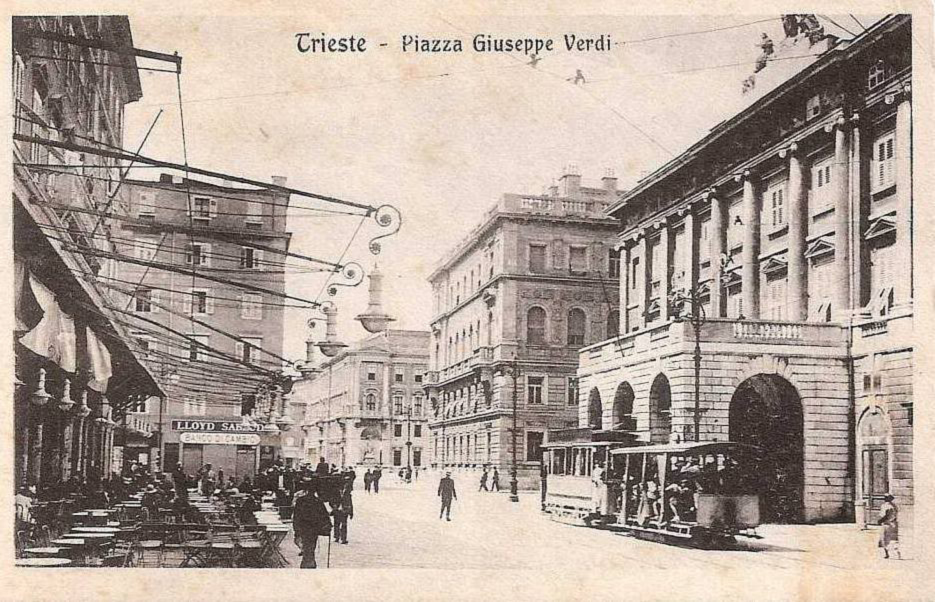 Trieste - Piazza Verdi